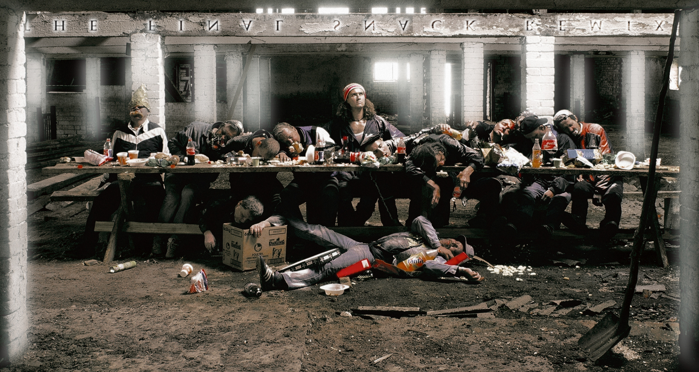 Peeter Laurits, Ain Mäeots, Mullatoidu Restoran